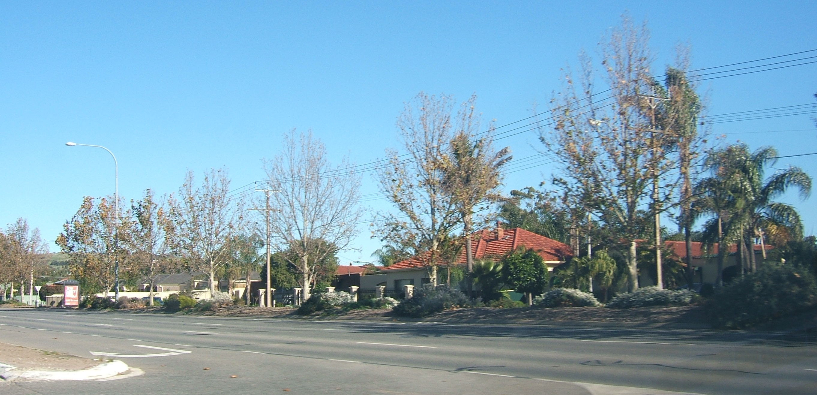 Sturt, Adelaide